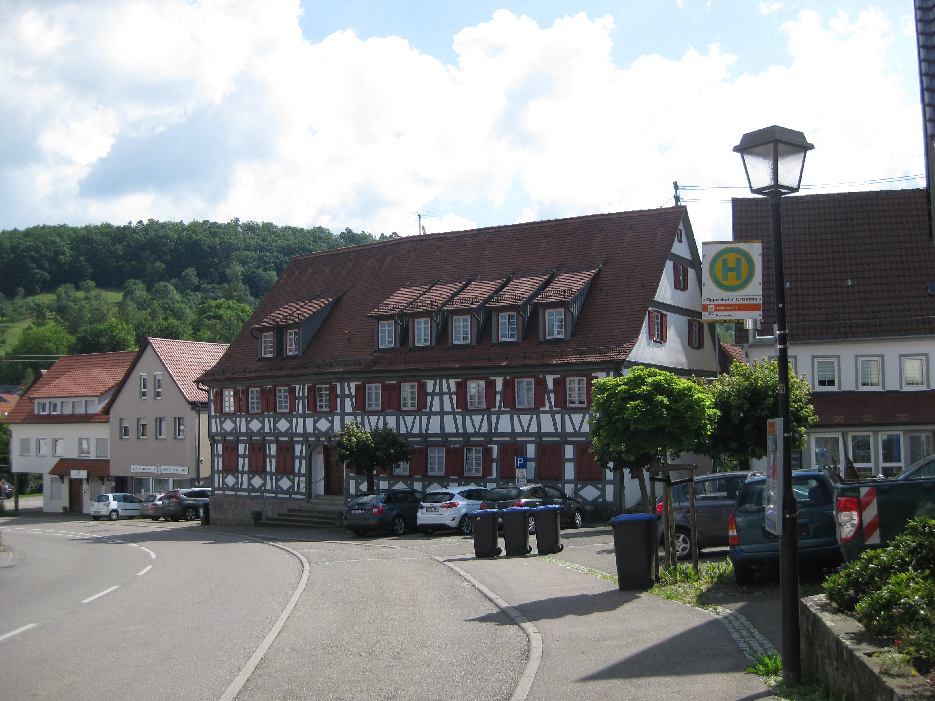 Berglen-Oppelsbohm im Jahr 2020